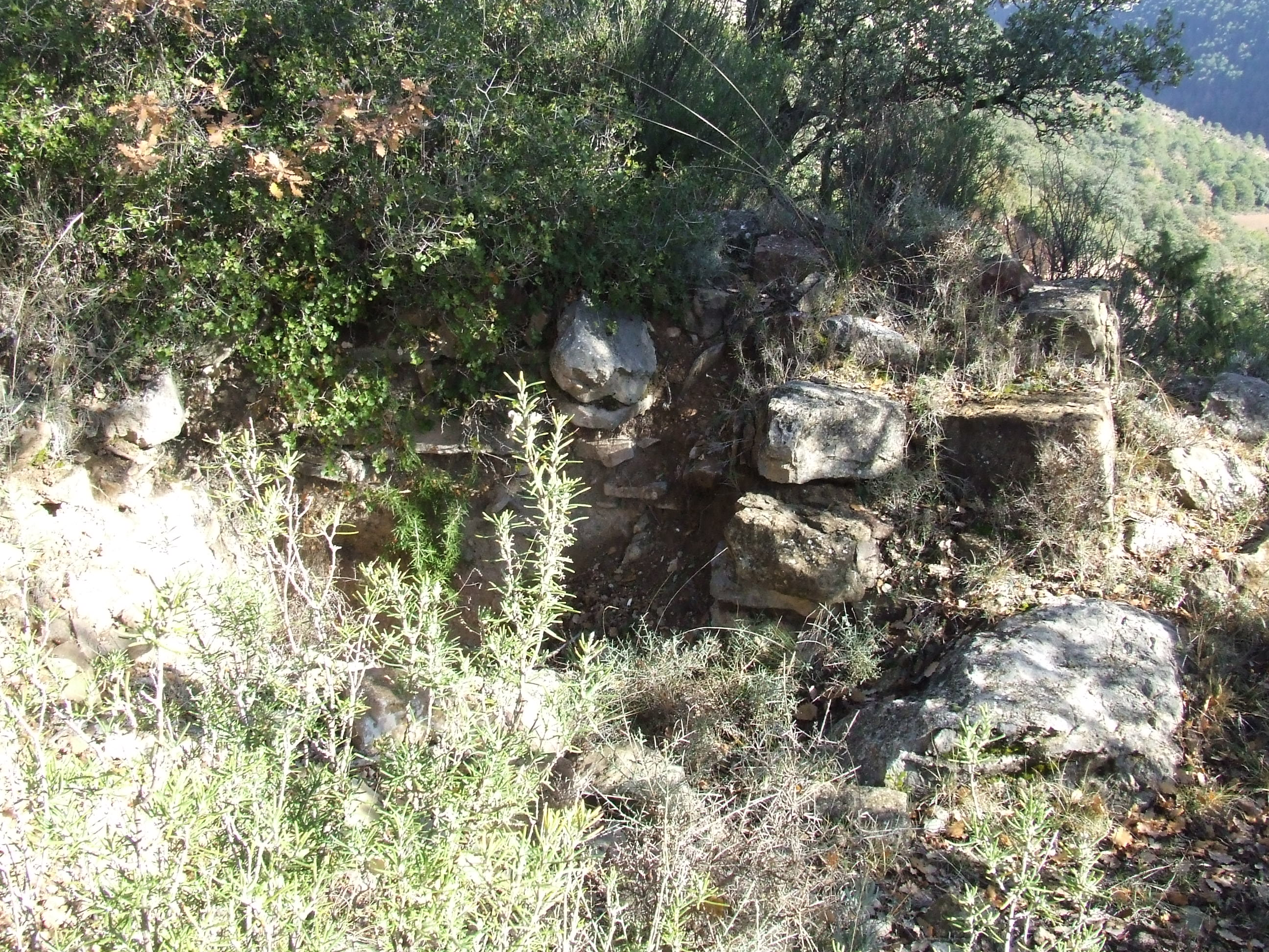 Restes de Sant Miquel d'Abella de la Conca (Abella de la Conca, Pallars Jussà)